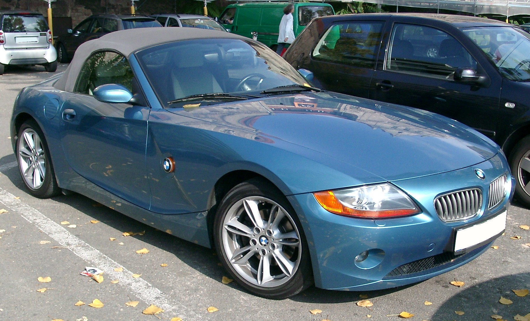 BMW Z4